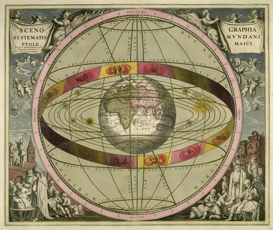 Andreas Cellarius: Harmonia macrocosmica seu atlas universalis et novus, totius universi creati cosmographiam generalem, et novam exhibens, Amsterdam : G. Valk und P. Schenk, 1708. Scenographia systematis mundani ptolemaici